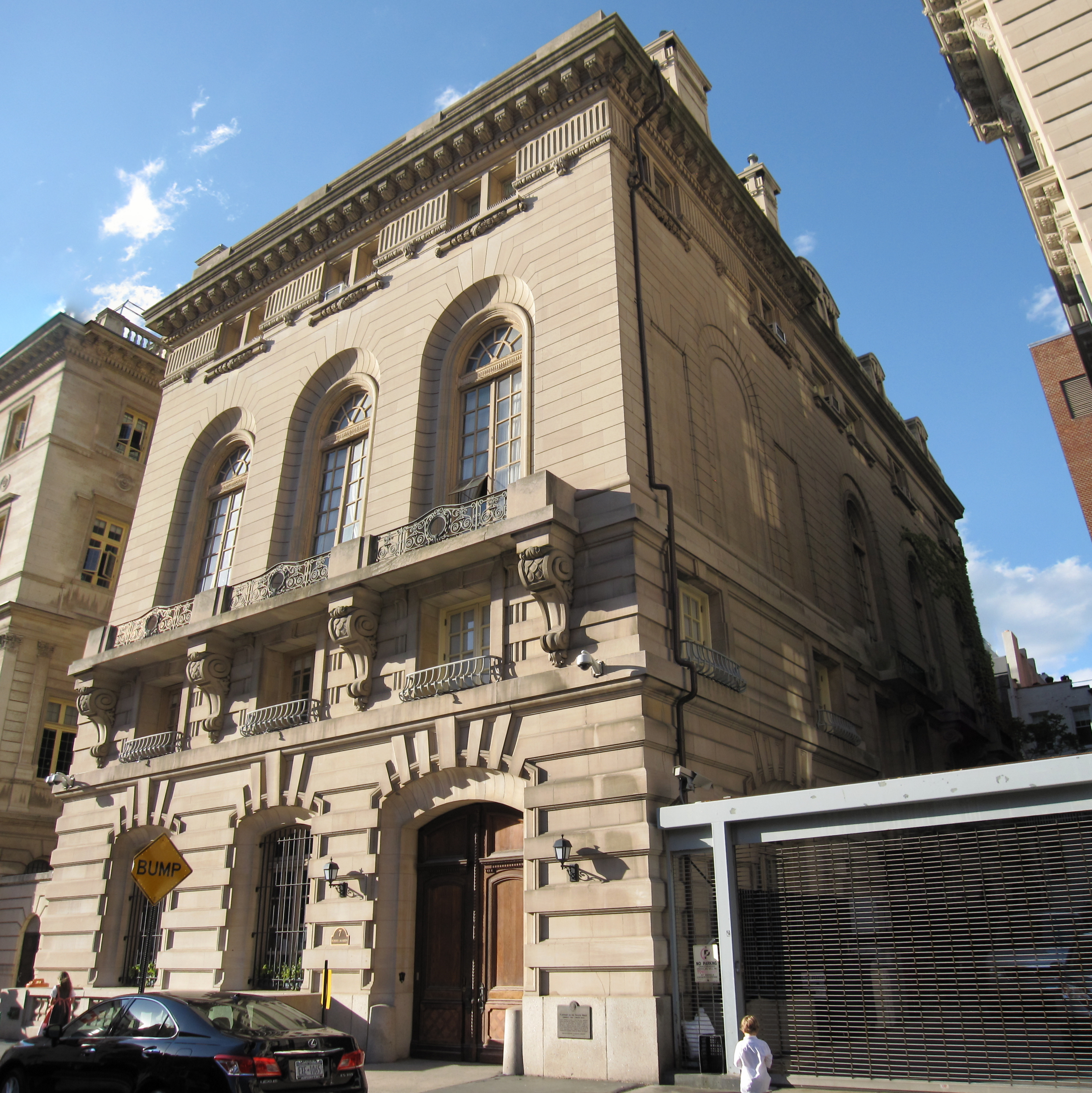 James A. Burden House